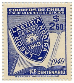 1949 1° CENTENARIO ESCUELA DE ARTES Y OFICIOS 1848-1948